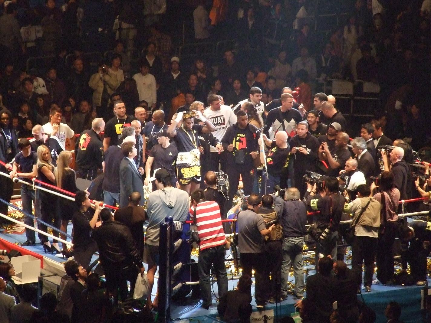 Entrega de premios a los participantes en el World GP 2008 que se adjudicó Remy Bonjasky.